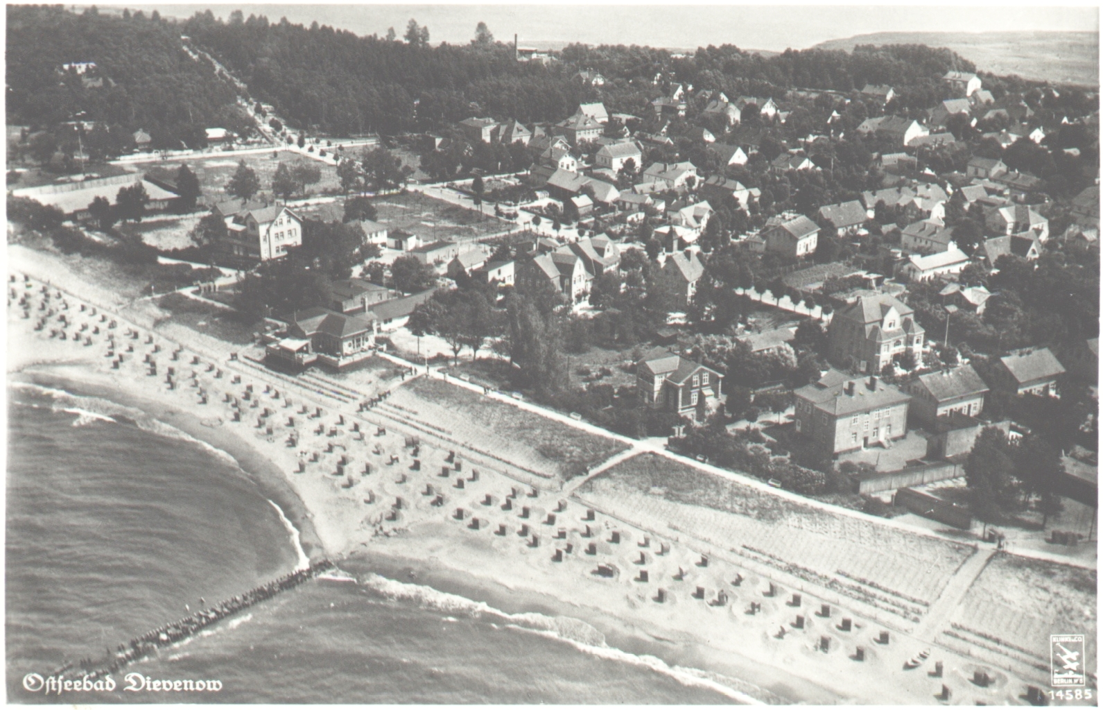 Dziwnów na starej fotografii.